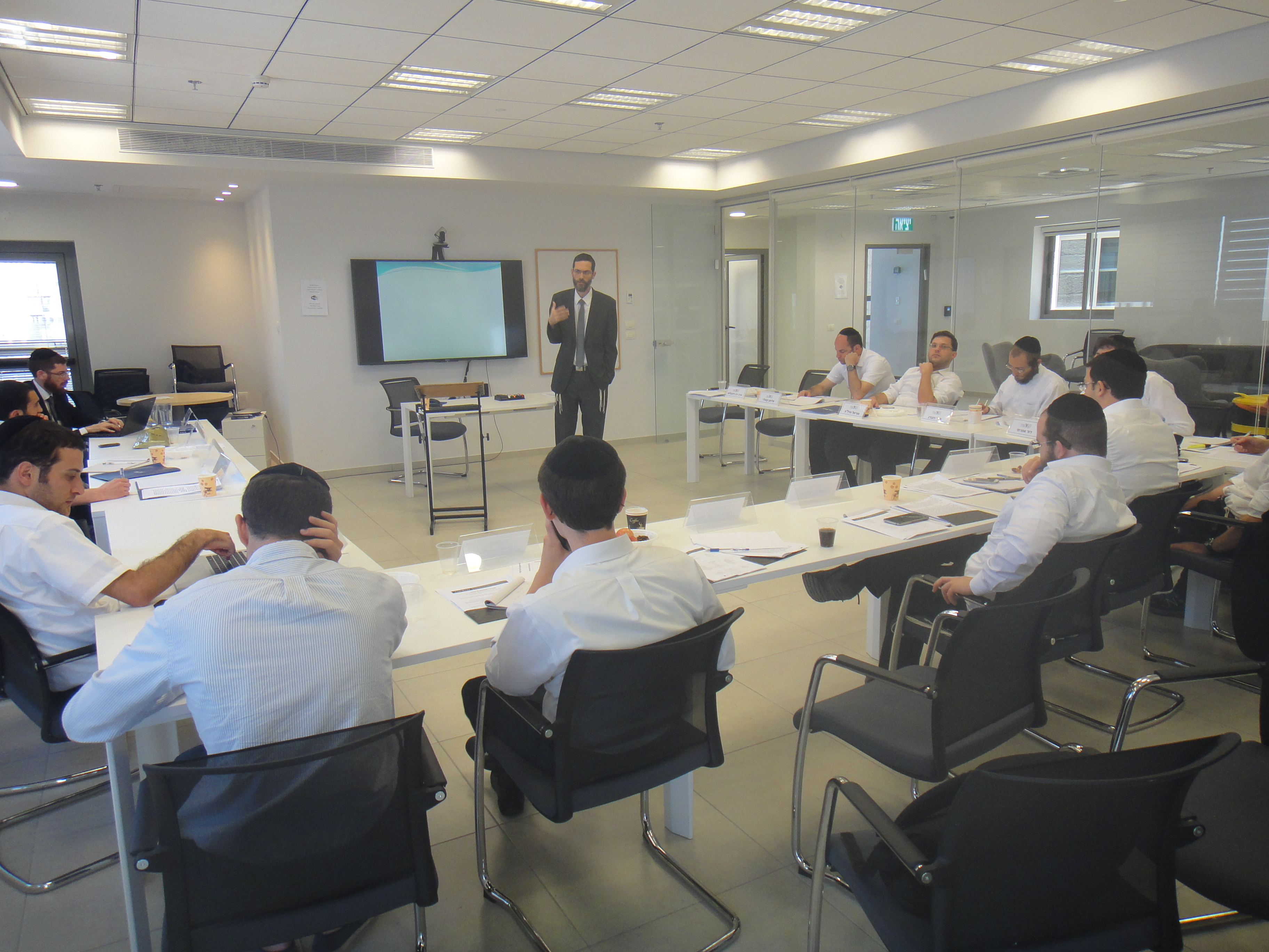 סמינר קיץ של קרן תקווה